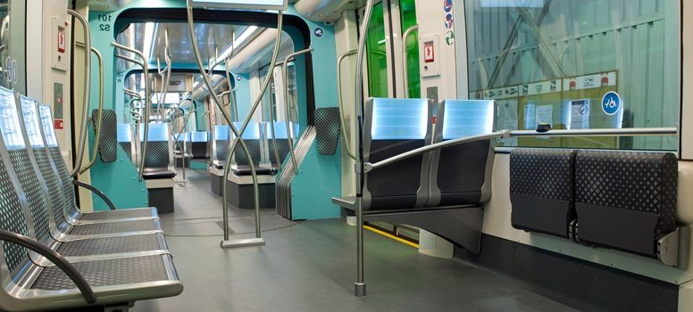 intérieur du rame CAF Urbos du tram de la ville de Luxembourg.